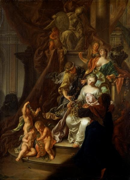 Allegorie auf die Vermählung der Prinzessin Maria Josepha von Sachsen mit dem Dauphin von Frankreich (Louis Ferdinand von Frankreich) im Jahre 1747/48